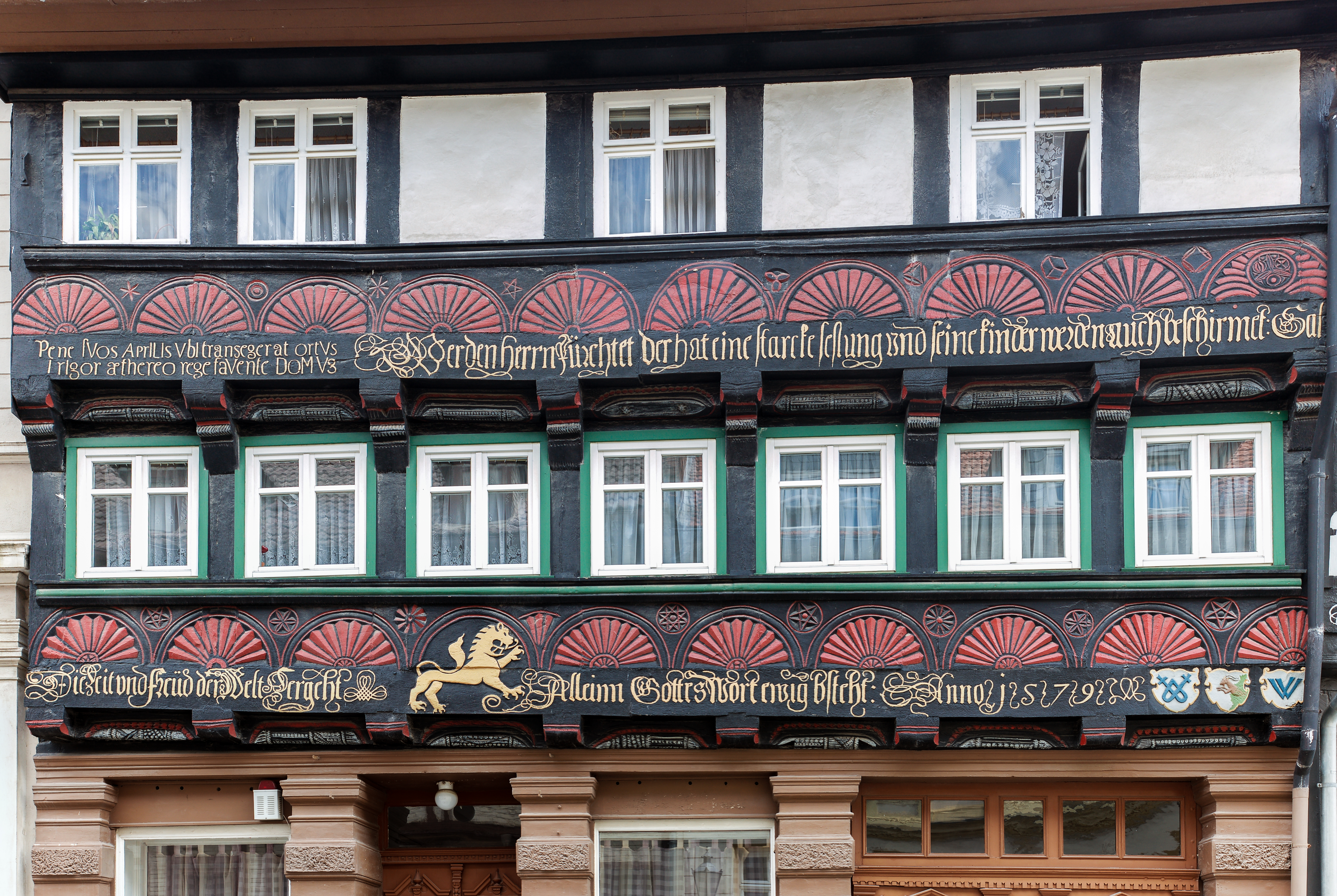 denkmalgeschütztes Haus in der Altstadt von Osterwieck